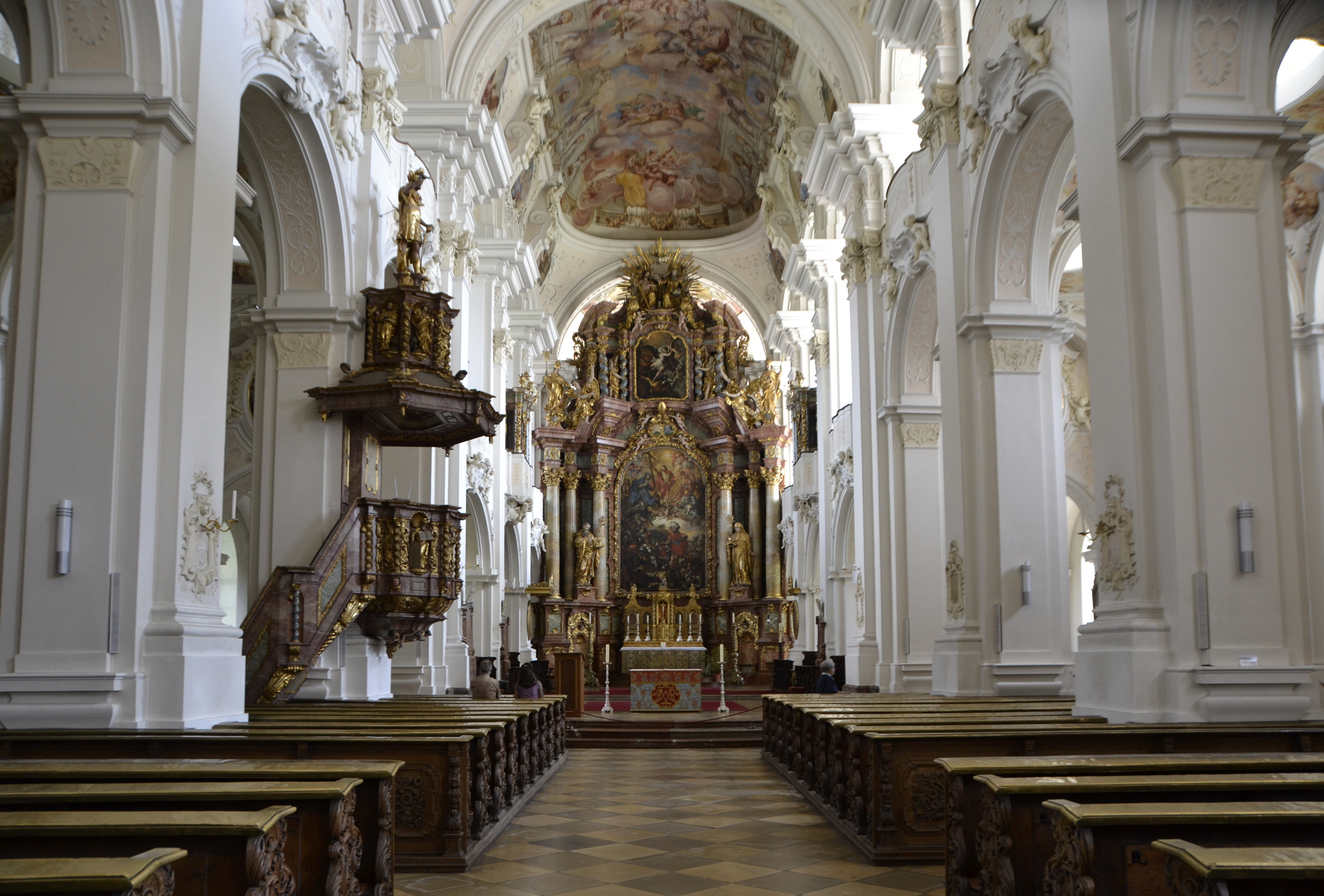 Die Klosterkirche Niederaltaich. Das Foto wurde im Sommer 2012 aufgenommen.